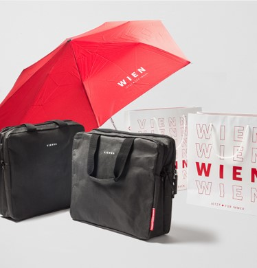 © WienTourismus/Paul Bauer